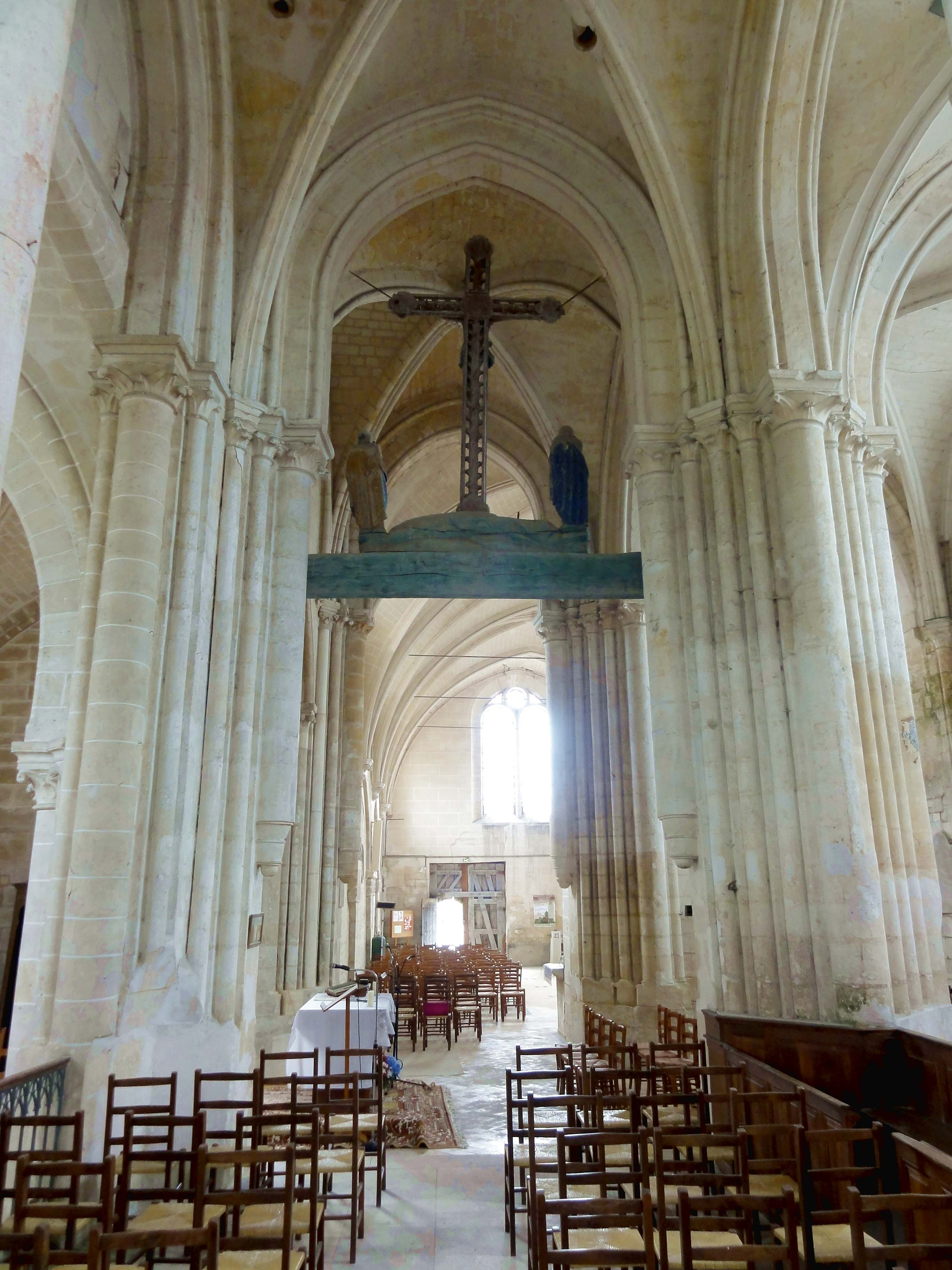 Intérieur de l'église - voir titre.